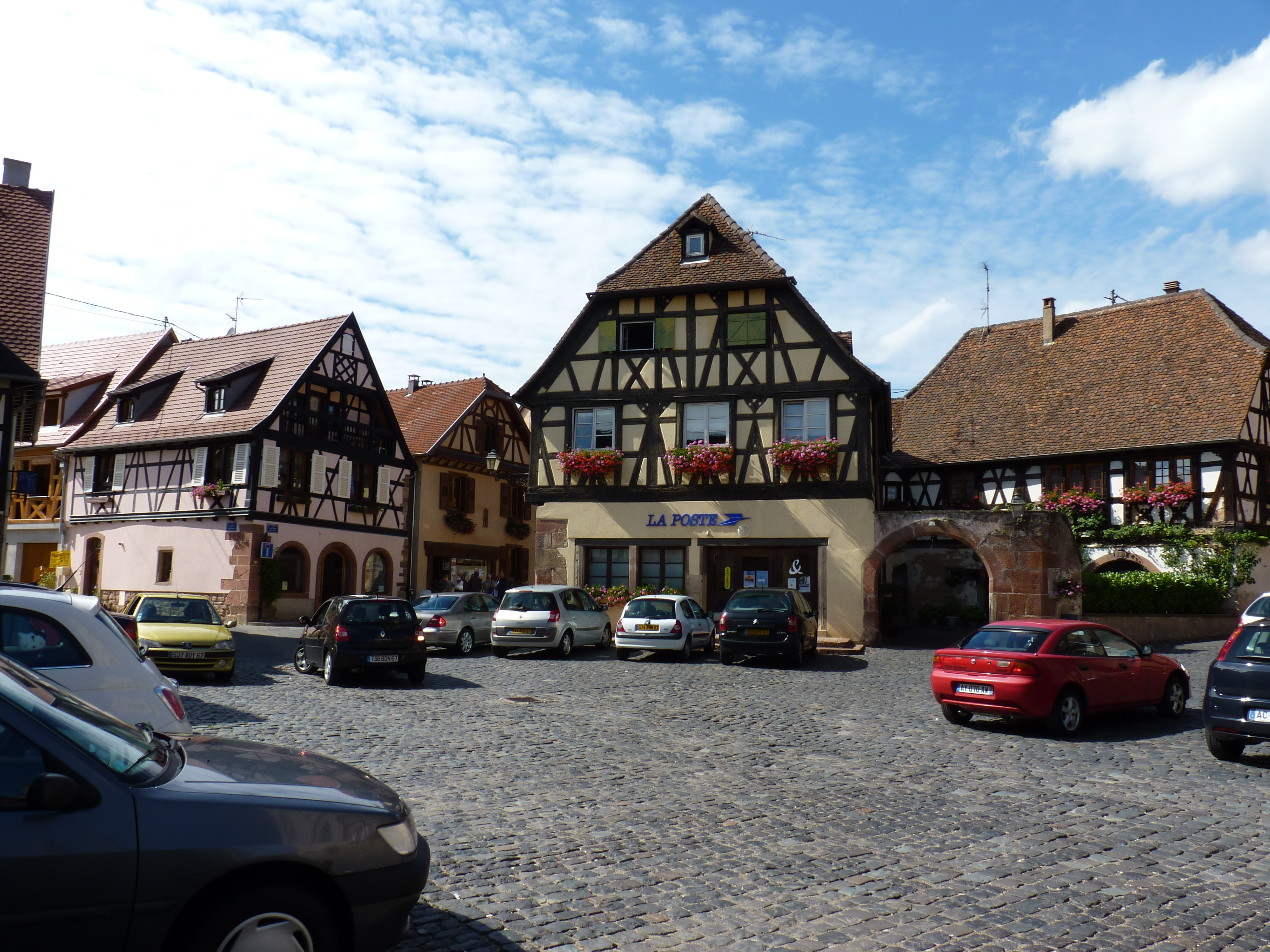 Alsace, Bas-Rhin, Boersch, Ancienne école (XVIIe), actuellement maison, 1 rue du Rempart, place de l'Hôtel de ville